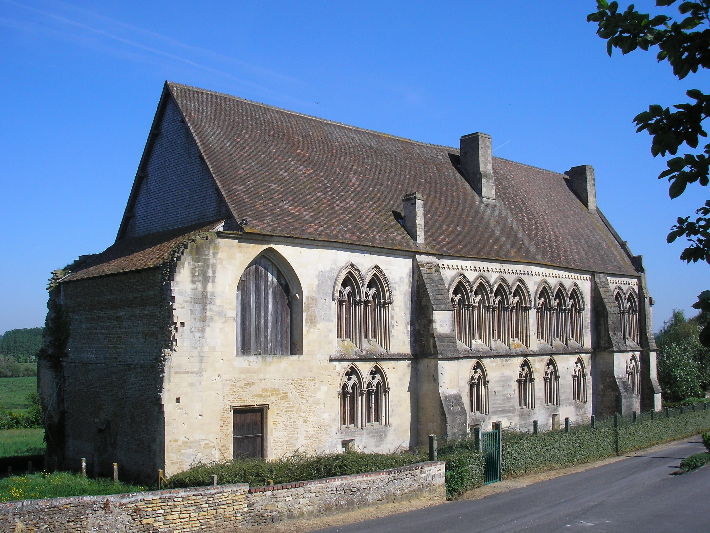 Troarn (Normandie, France). L'abbaye Saint-Martin.